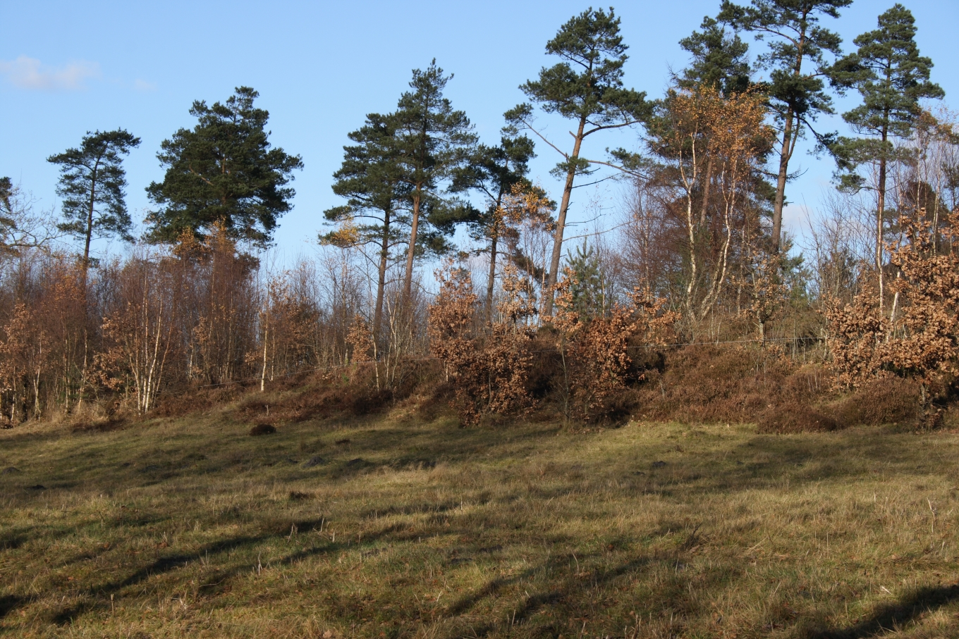 Tinnet Krat: Pine-oak forest.